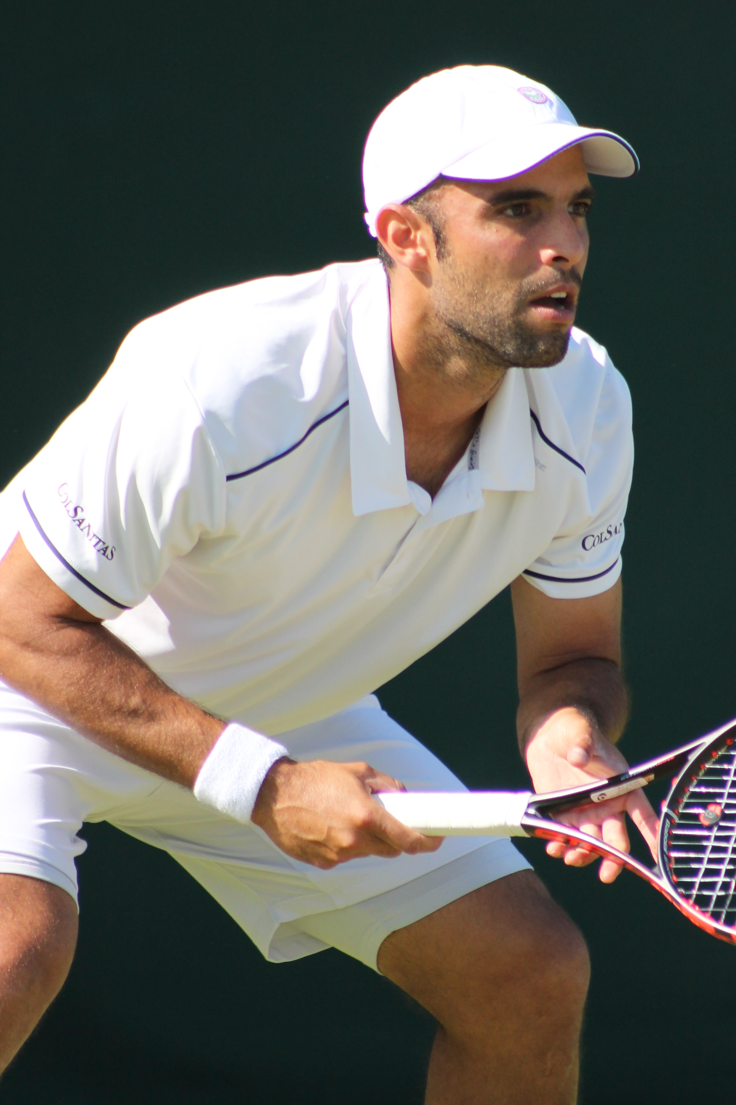 Cabal WM15 (10)